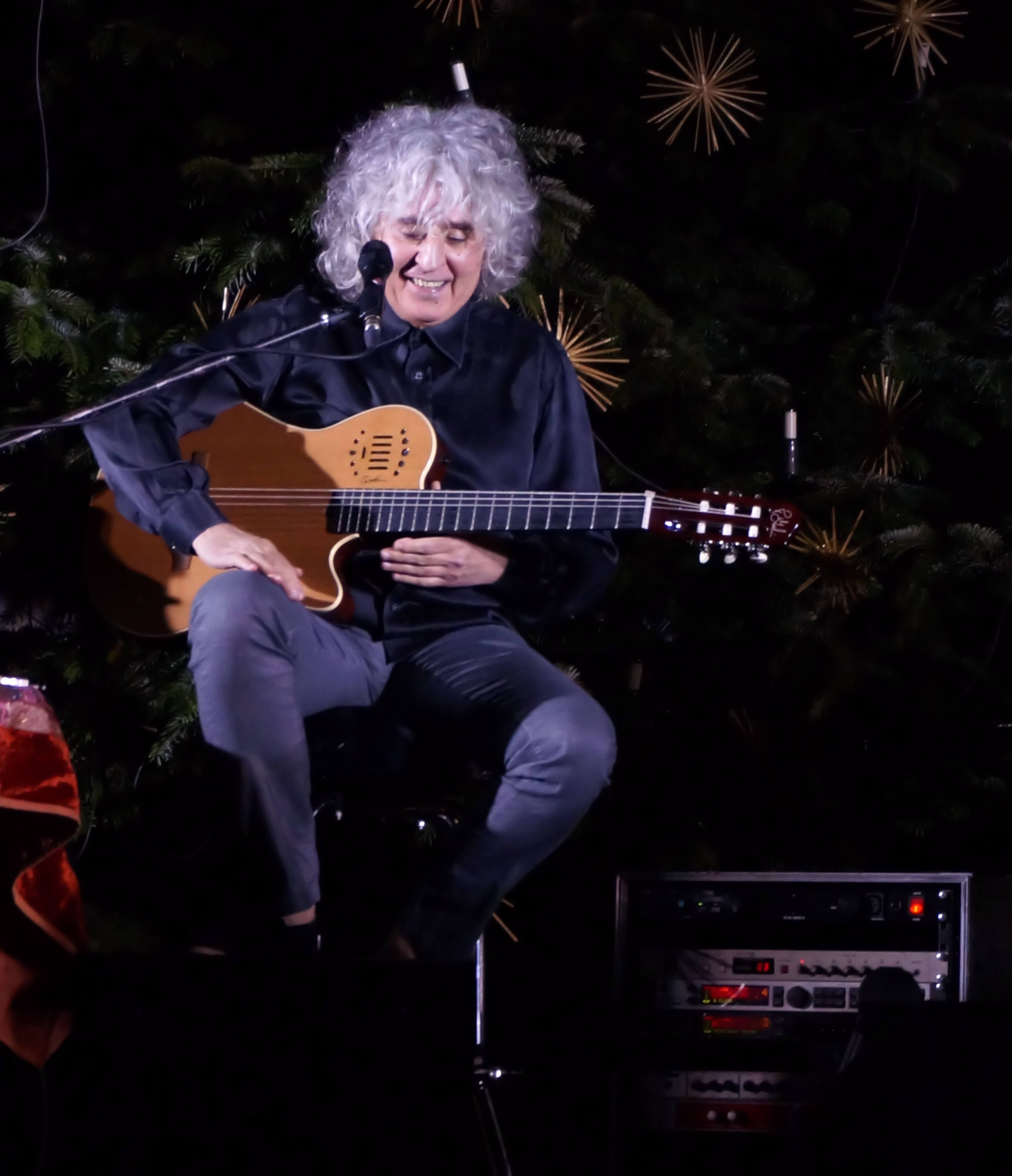 Der italienische Musiker Angelo Branduardi im Januar 2014 beim Auftaktkonzert zu seiner Kirchentour in der evangelischen St. Mathäuskirche am Münchner Altstadtring